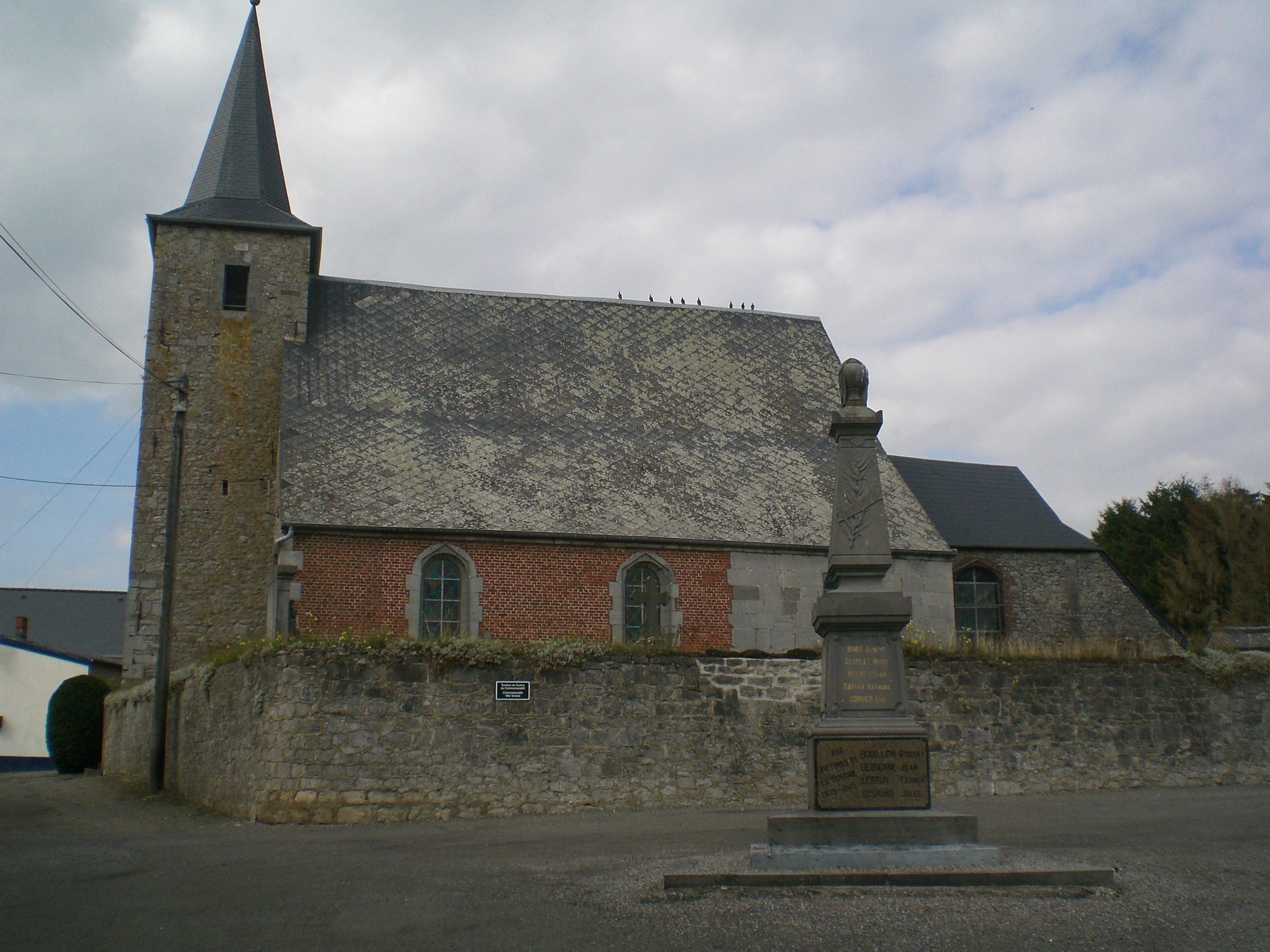 eglise d'hestrud